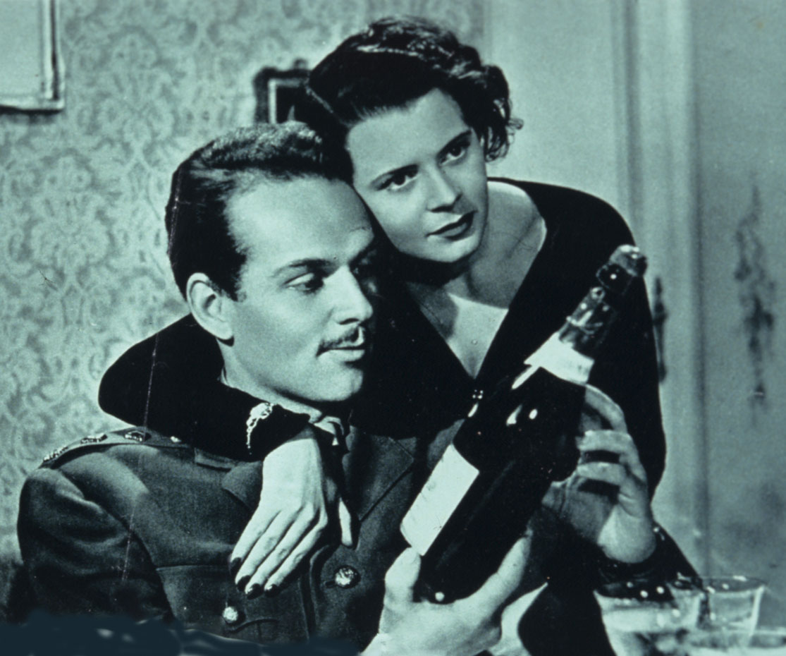 Lianella Carell e Frank Latimore